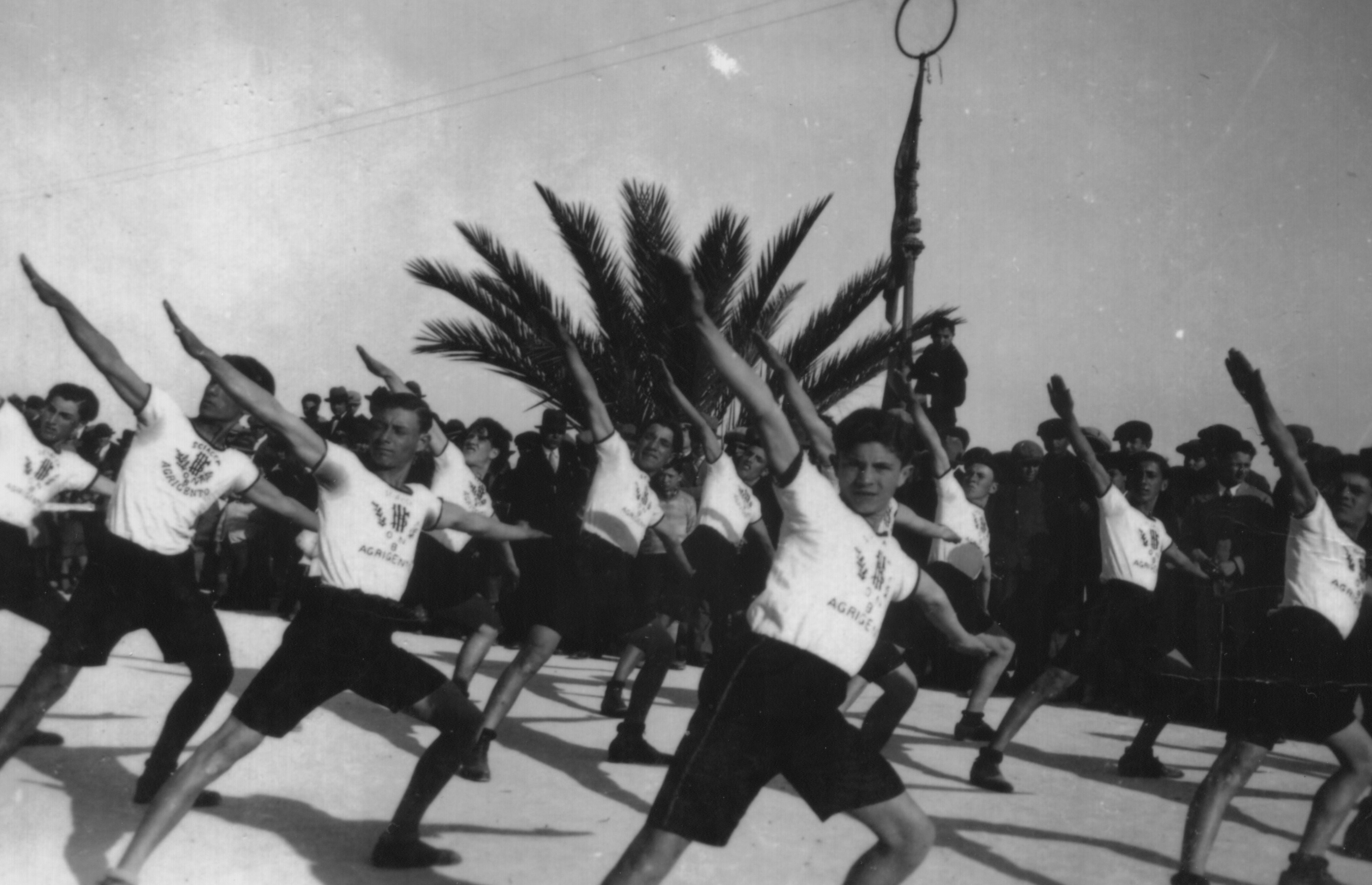 Italia. Un saggio ginnico pubblico eseguito durante il periodo fascista; il primo a destra è Silvio Riggio.